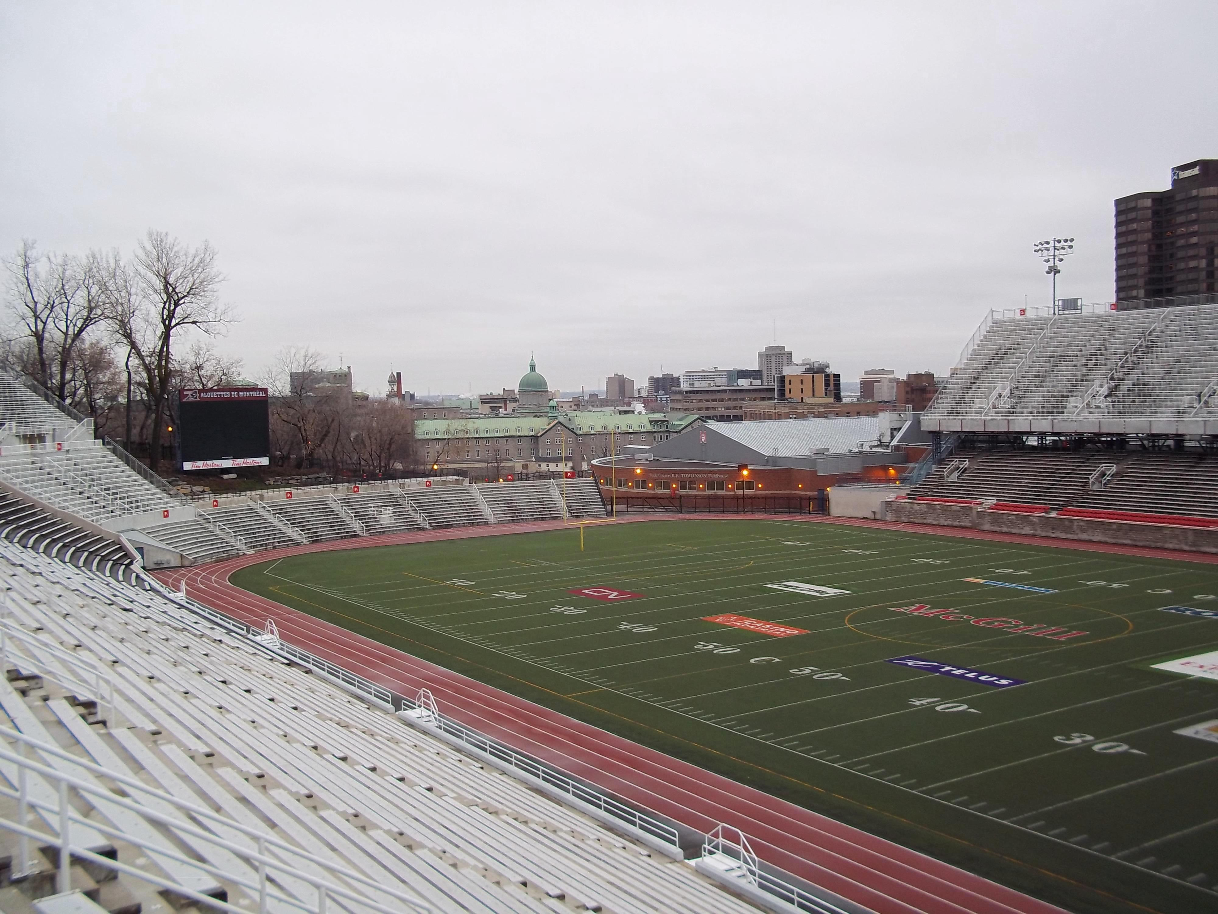 Stade Percival-Molson